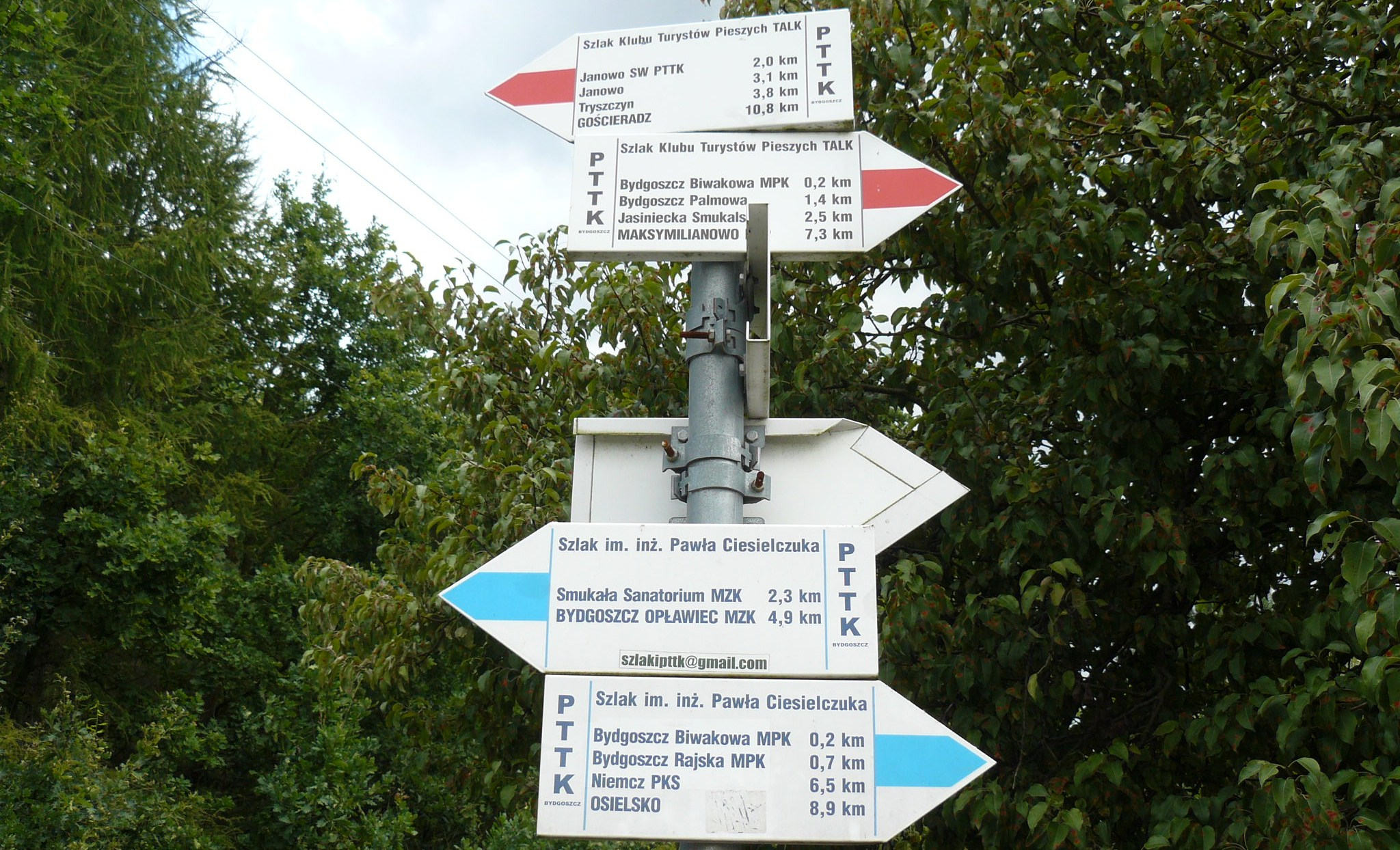 Szlaki turystyczne Opławca i Smukały - Bydgoszcz.